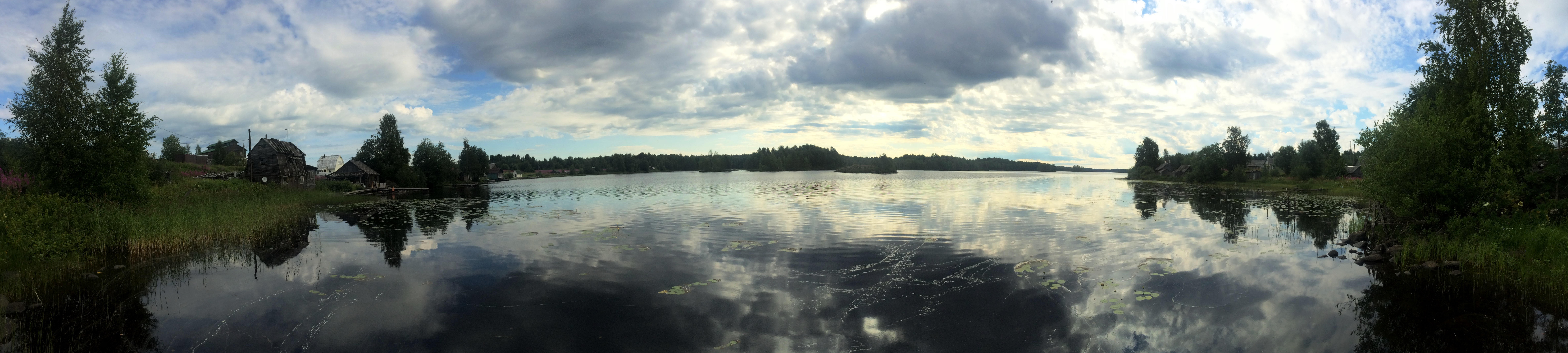 Карзикозеро (озеро)